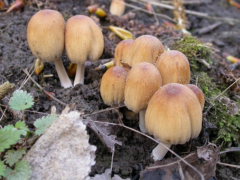 Coprinus micaceus, Cessac, Gironde